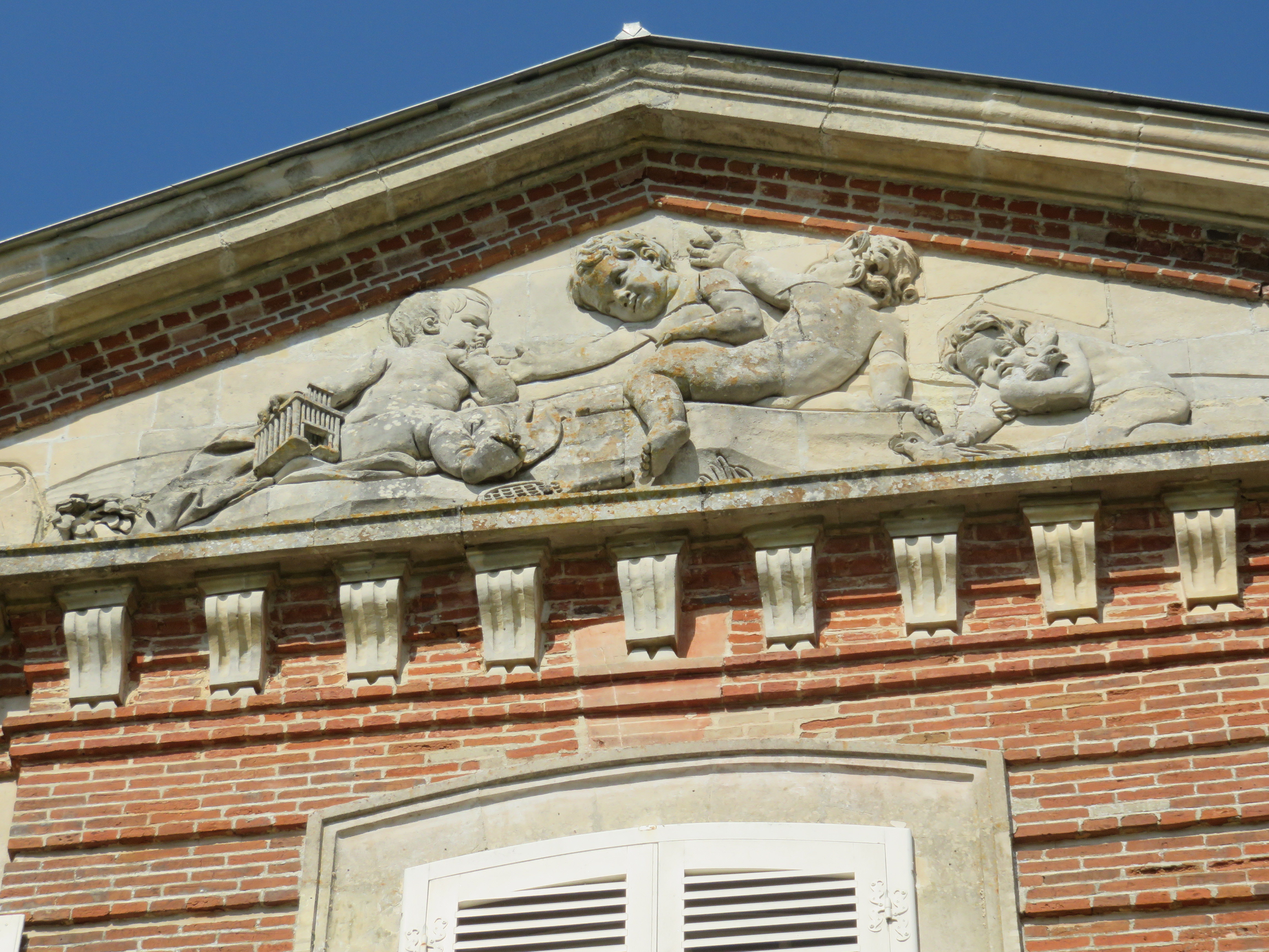 Château de Chèreperrine, fronton sud d'origine ( XVIIIe siècle) avec son bas-relief montrant quatre enfants jouant.